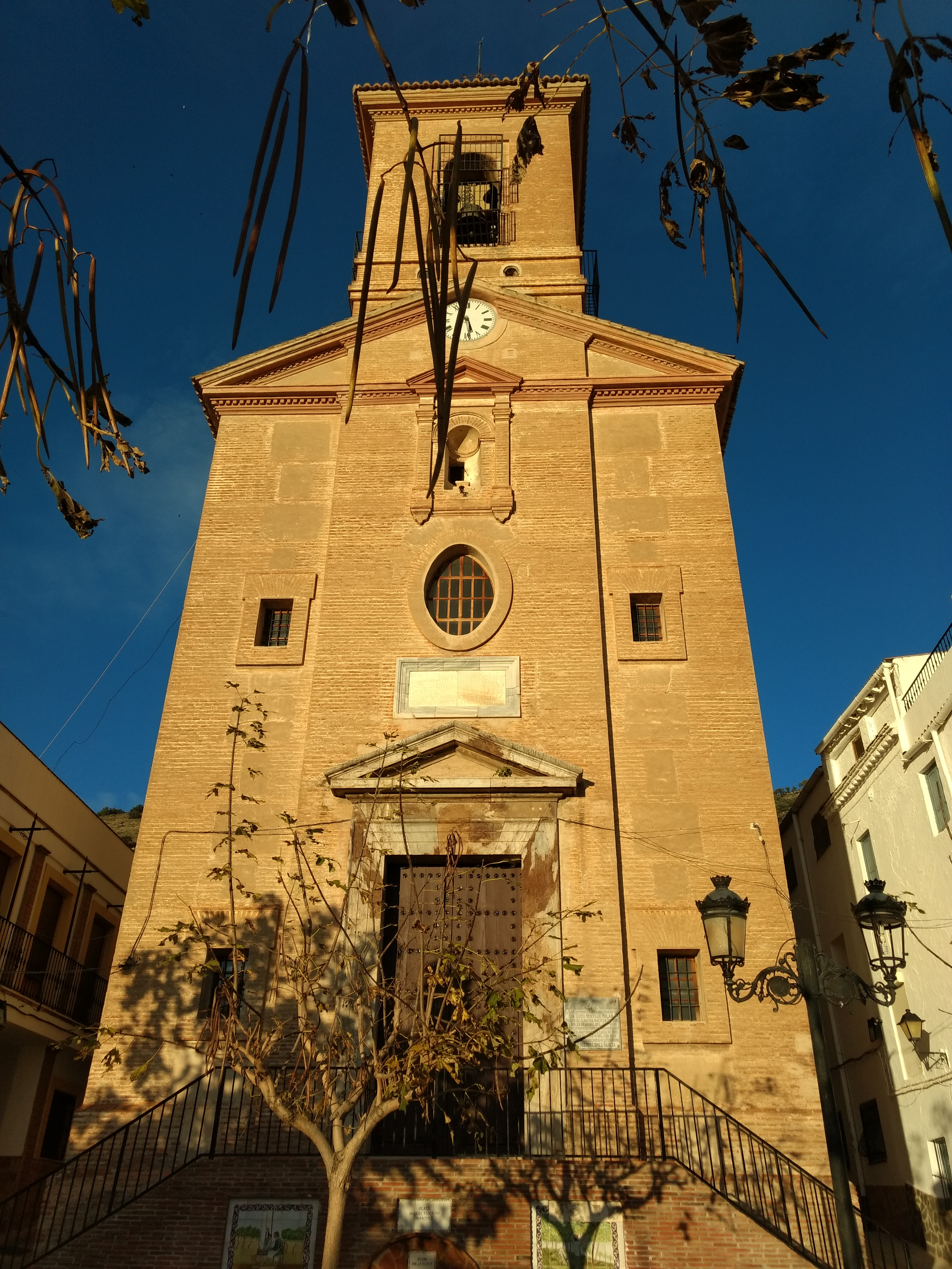 Ohanes (Almería)